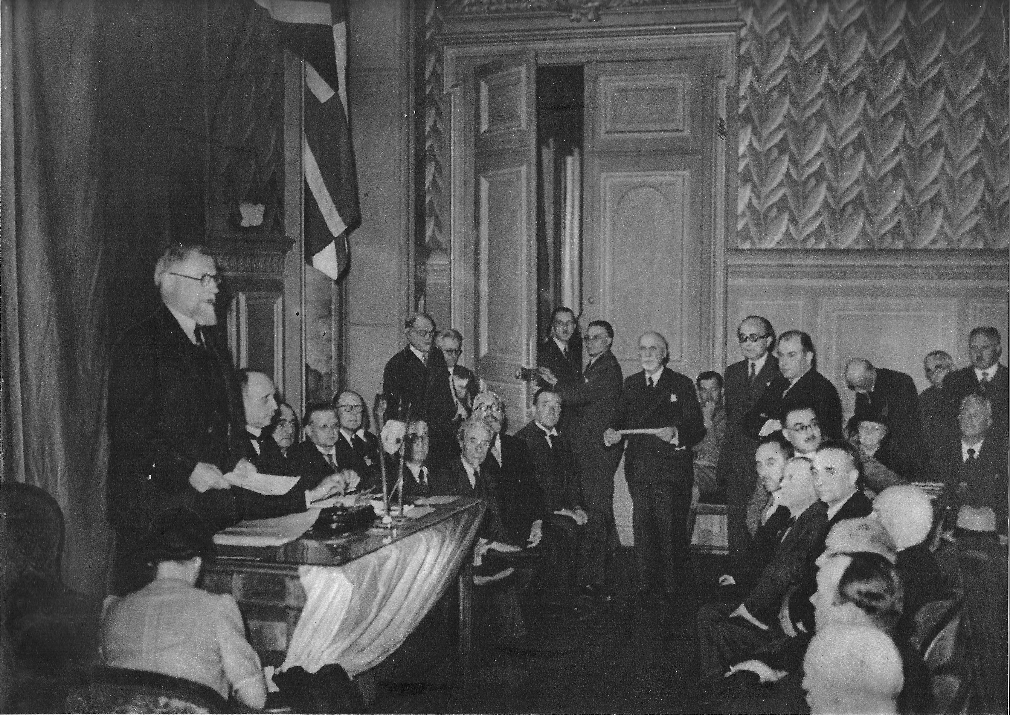 Frans Van Cauwelaert, président de la Chambre des Représentants de Belgique, adresse ses remerciements à la municipalité de Limoges qui accueille les parlementaires belges en exil (fin mai 1940)